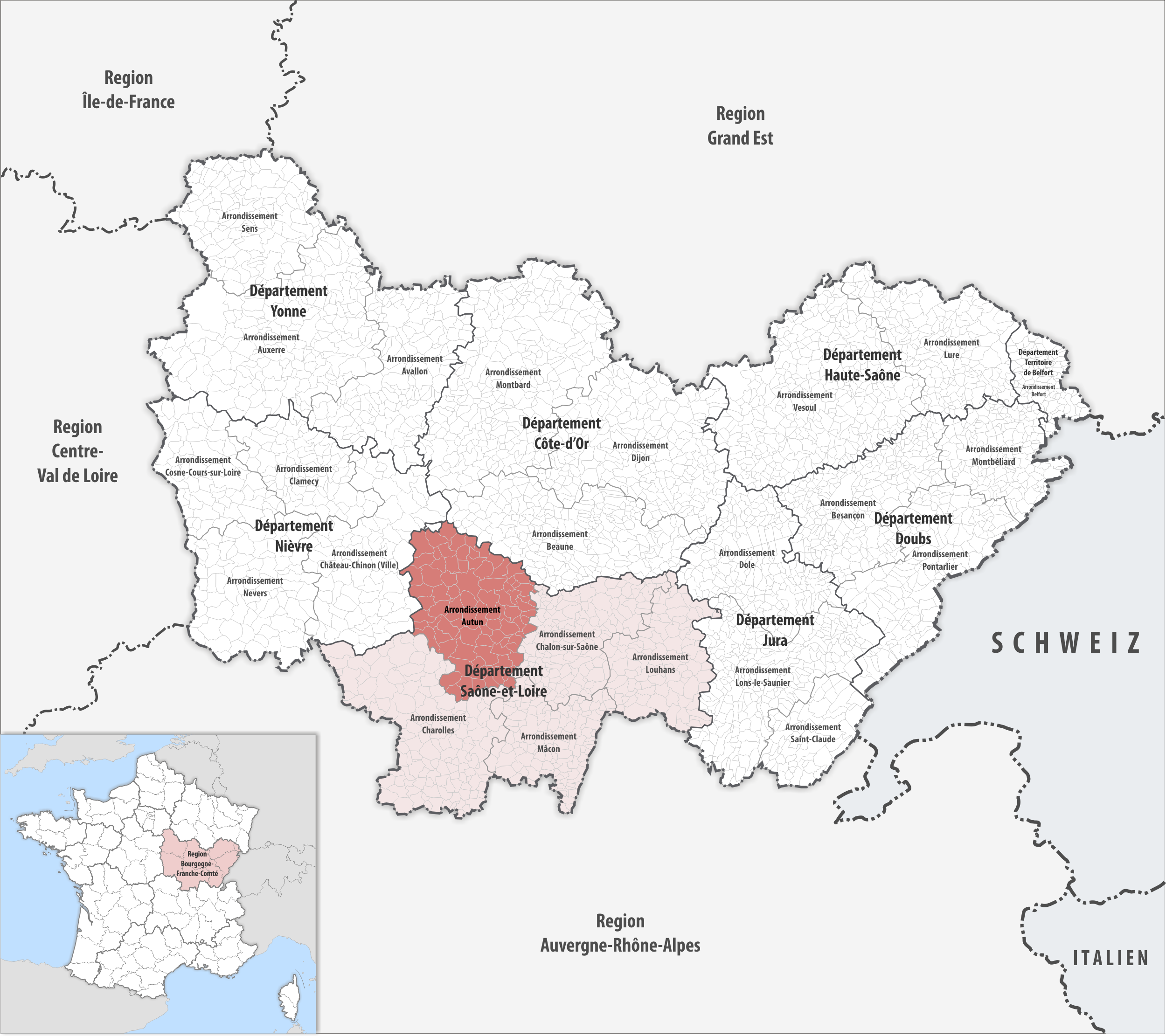 Lage des Arrondissements Autun